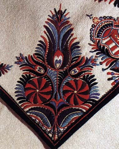 Virágtő szűrgallérról, szűrhímzés (Mátravidék, századforduló)